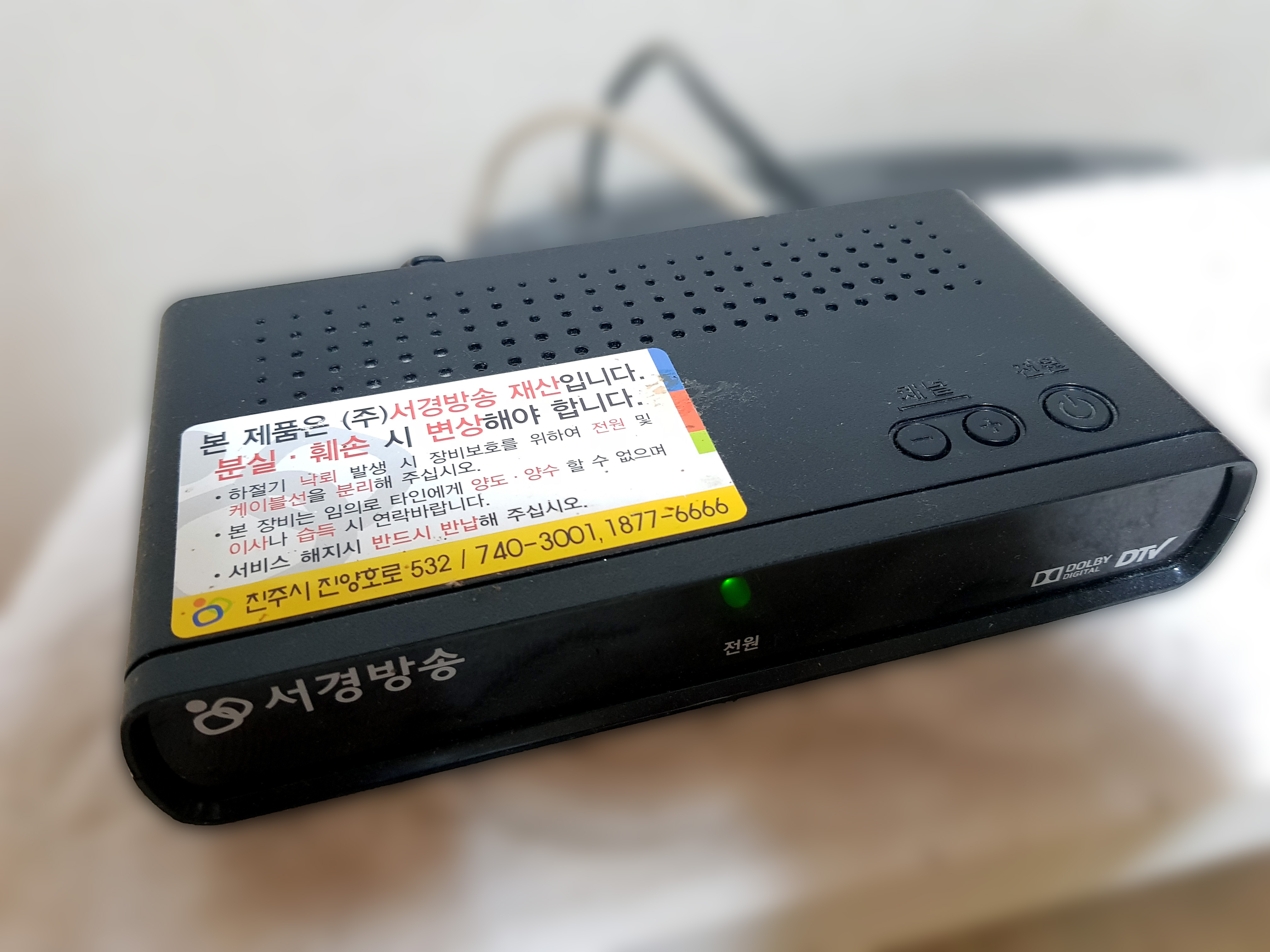 서경방송 DtoA 컨버터